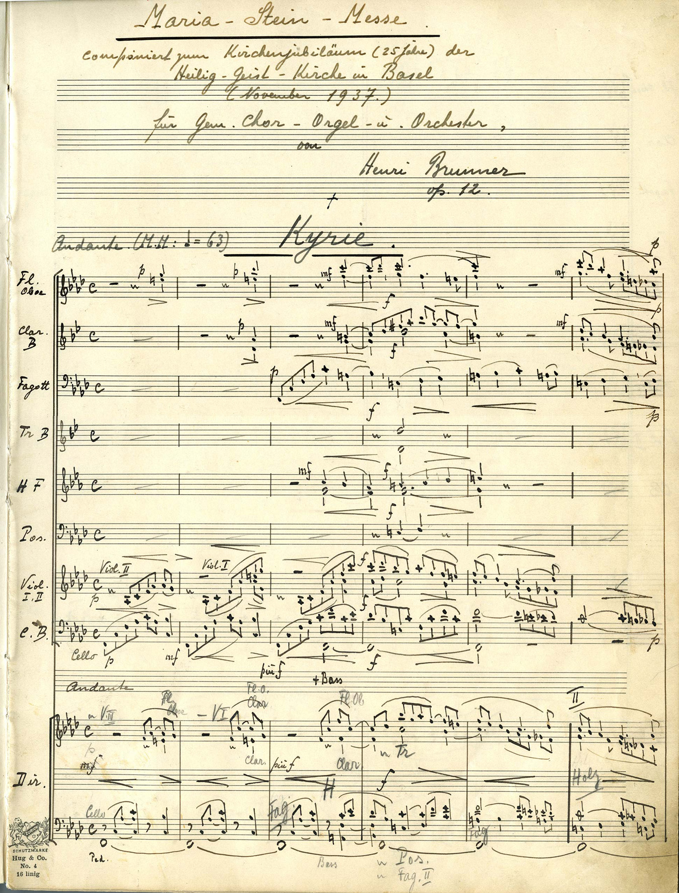 Titelbild des Autographen der Mariastein-Messe.